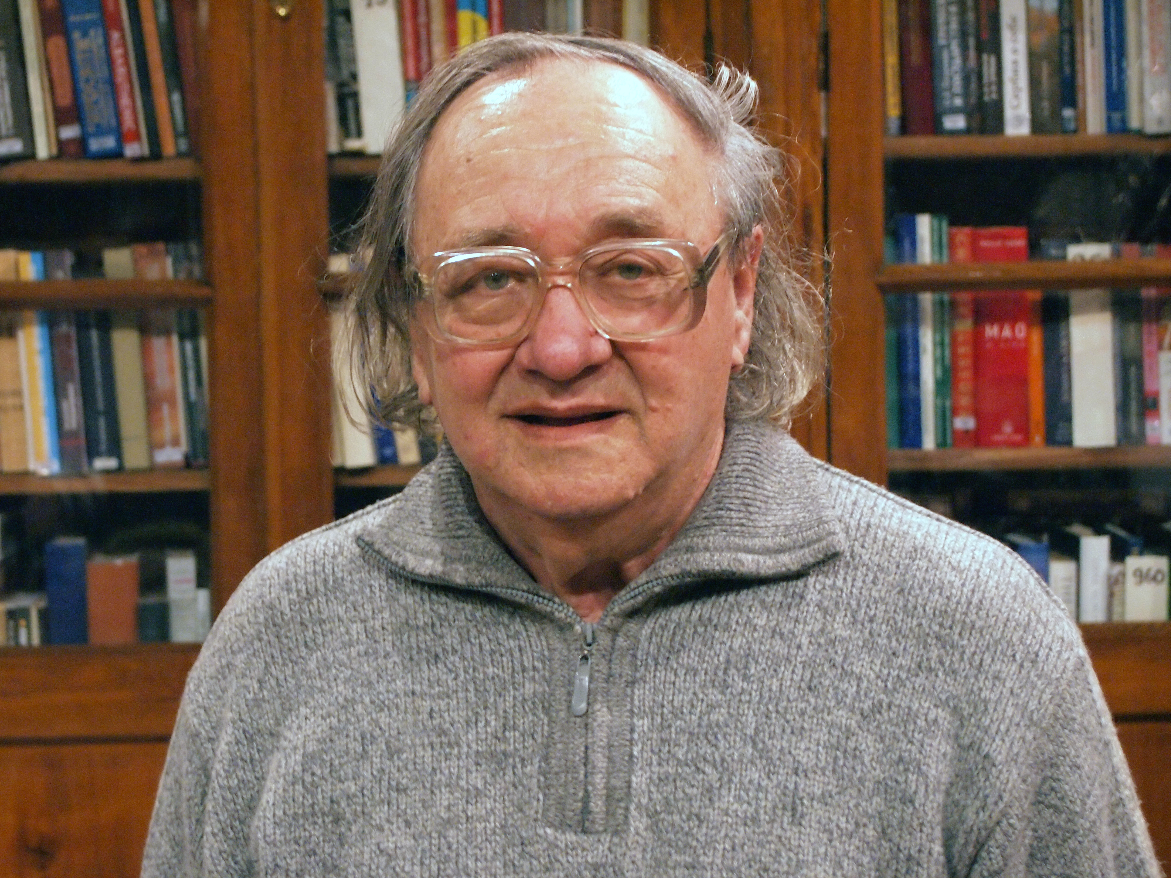 Валерій Шевчук на презентації другого тому книги «Наш Лука́ш» у Києво-Могилянській академії.